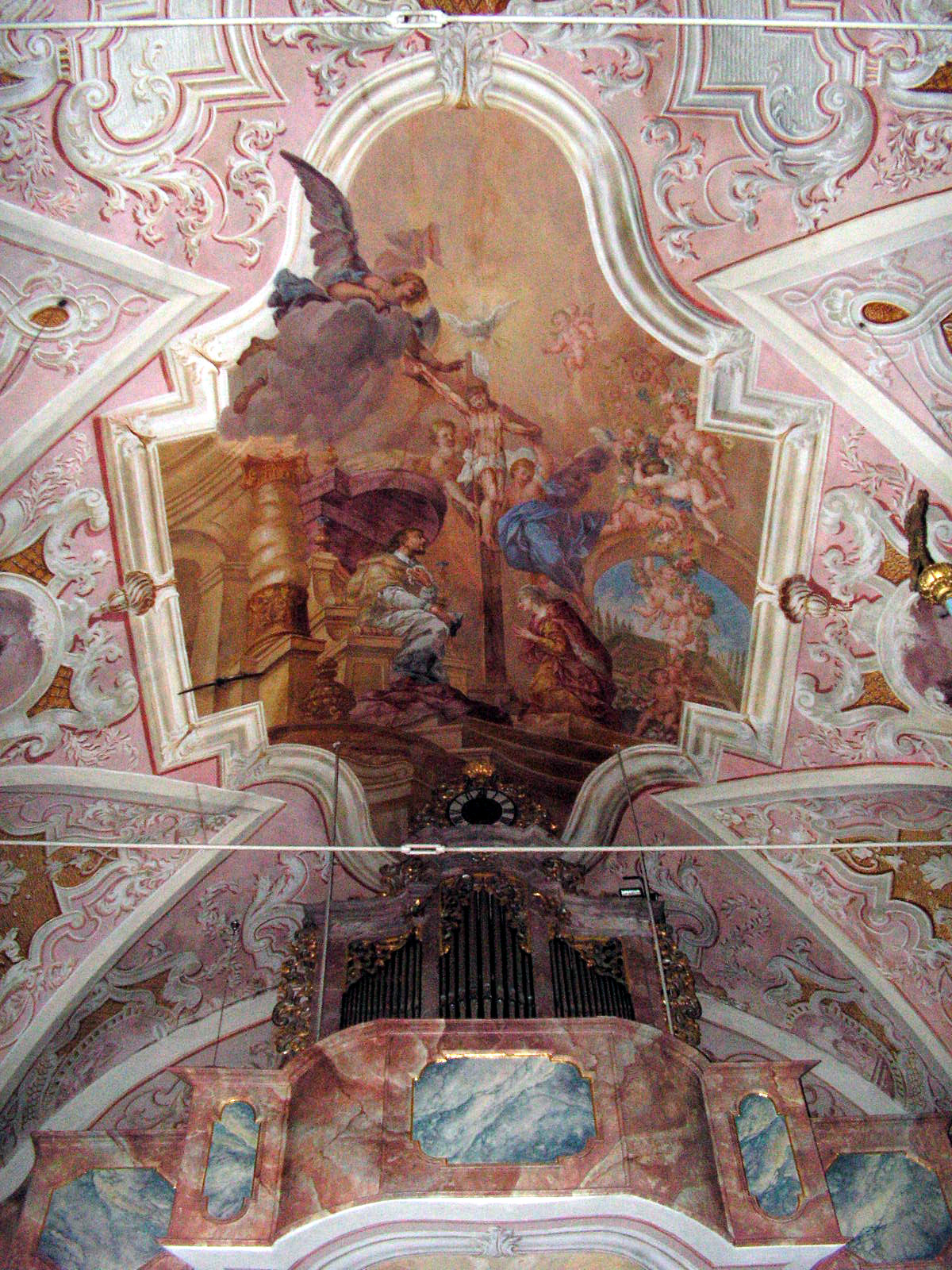 Westl. Langhausgewölbe der Pfarrkirche St. Johann v. Nepomuk in Thürnthenning (Gem. Moosthenning)